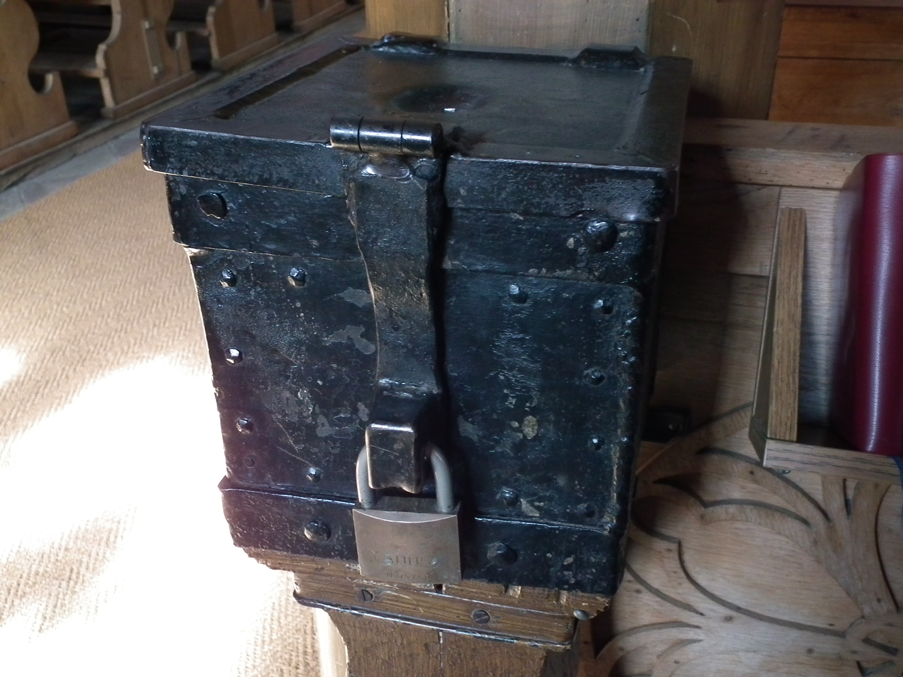 Opferstock in der katholischen Kirche St. Gallus in Ladenburg (Baden-Württemberg, Deutschland)